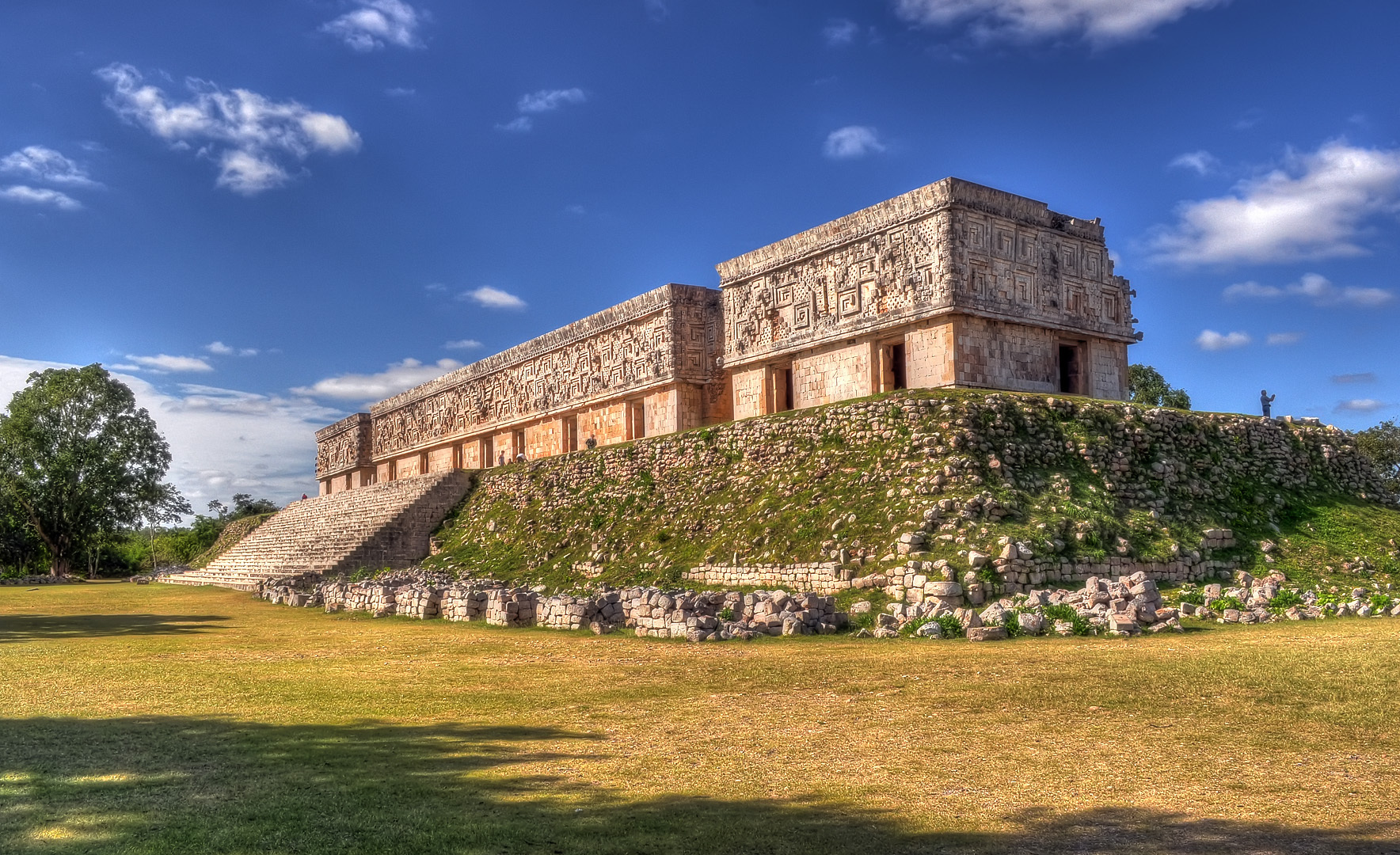 Uxmal